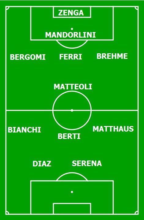 formazione inter 1989